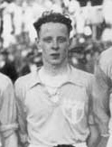 Karl Palmer, Malmö FF 1949